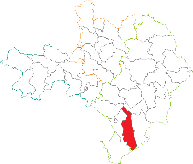 Situation du canton dans le département du Gard (France)